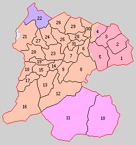 大分県大野郡の町村制時点の町村。